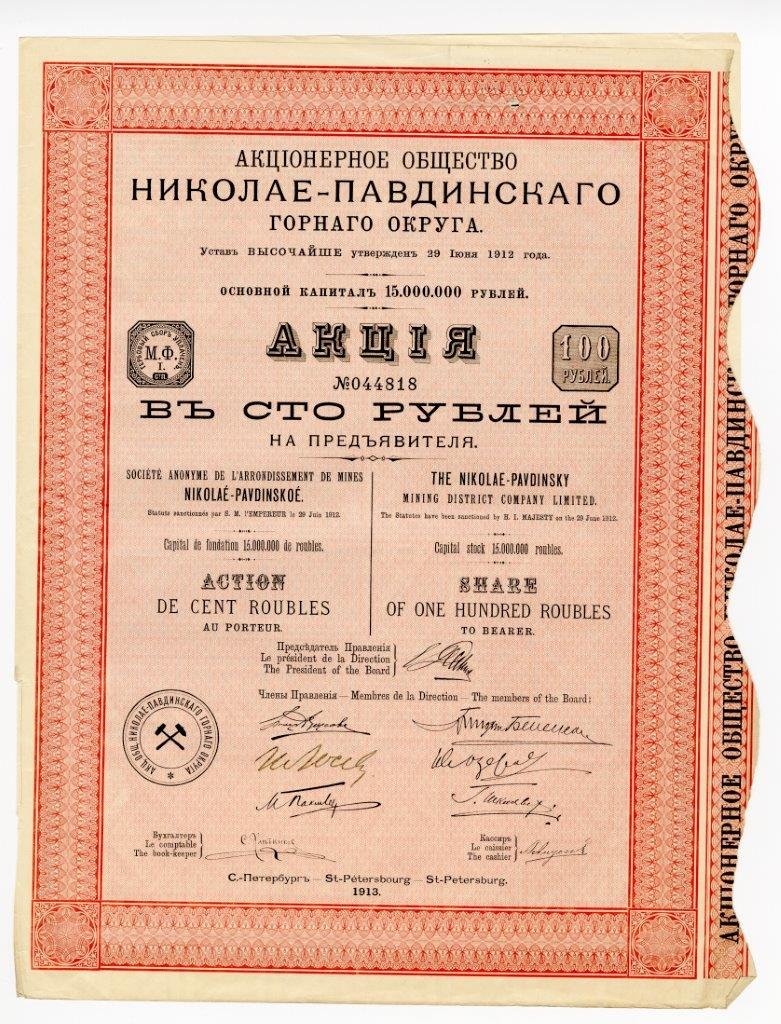 Акция в 100 руб. на предъявителя Акционерного общества Николае-Павдинского горного округа с основным капиталом в 15 млн. руб. С.-Петербург, 1913 г